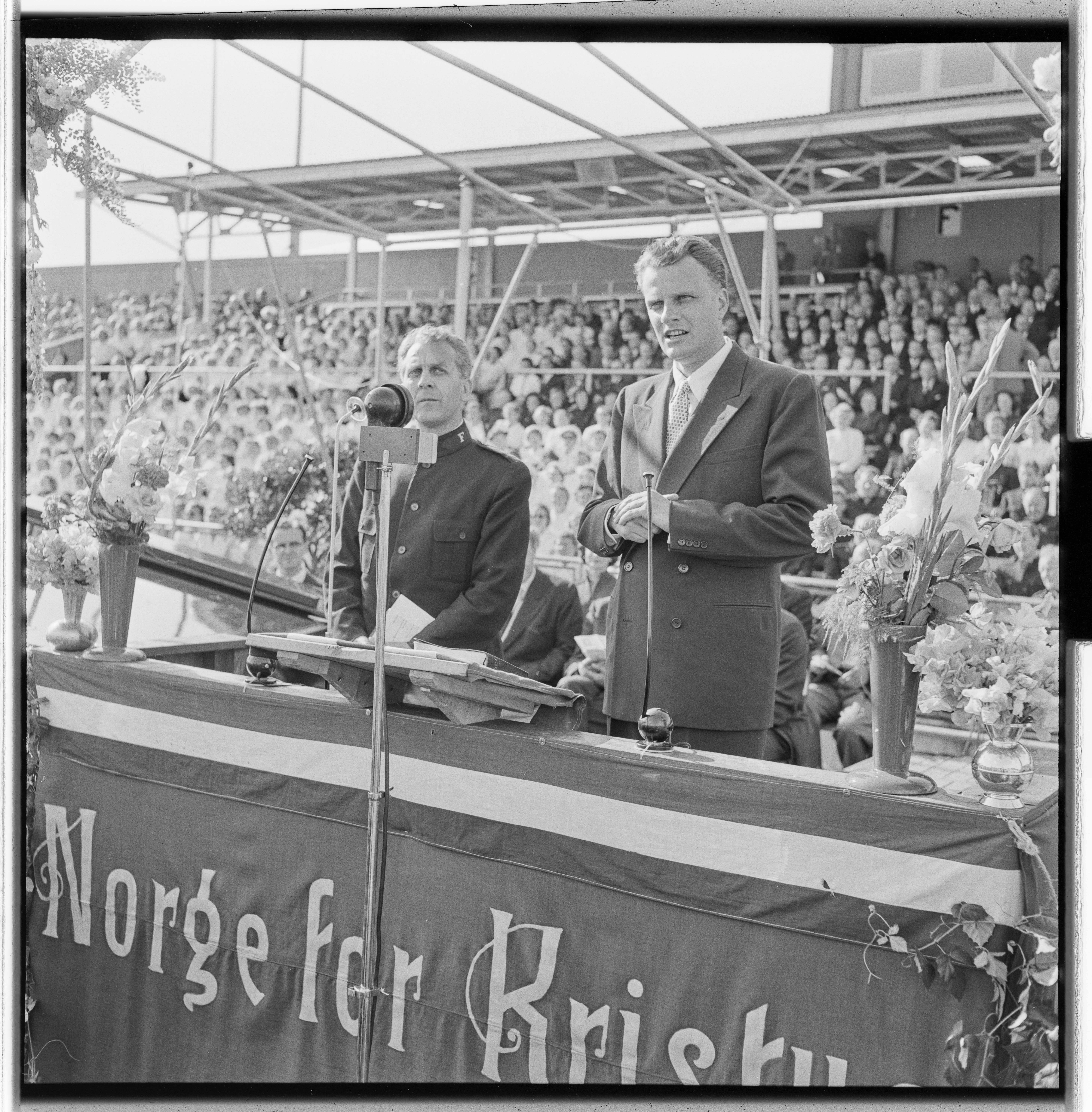 Bildet er hentet fra Arkivverket. Billy Graham Arkivinstitusjon : Riksarkivet Arkivnavn : Billedbladet NÅ Sted : Norge, Oslo, Oslo, Ullevål stadion Emneord: kristendom, forkynnelse, møter Avbildet: Graham, Billy